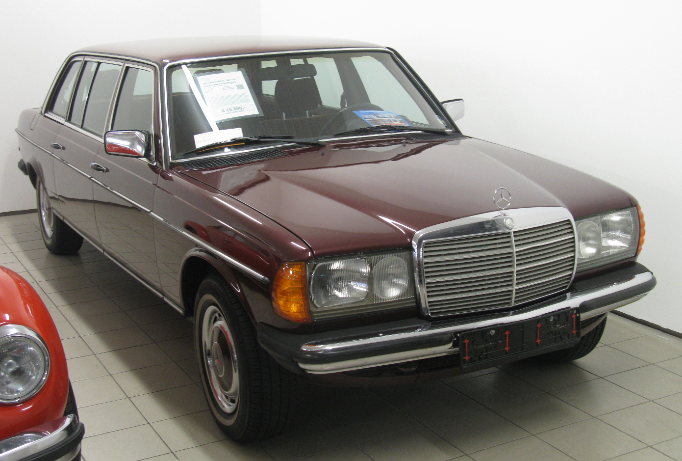 Mercedes-Benz 250 Lang W123